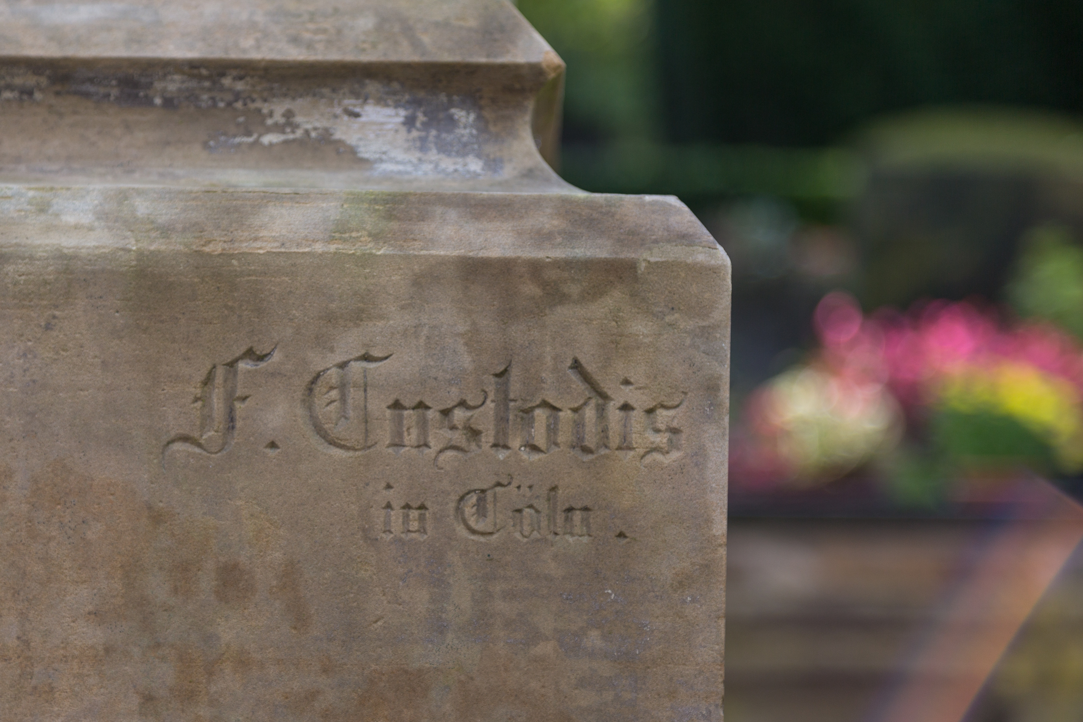 Rösrath, Denkmalnummer 65, Müllenbach-Grabmal, Christoph Heinrich nach der Renovierung im Jahr 2013. Bildhauer: F. Custodis This is a photograph of an architectural monument.